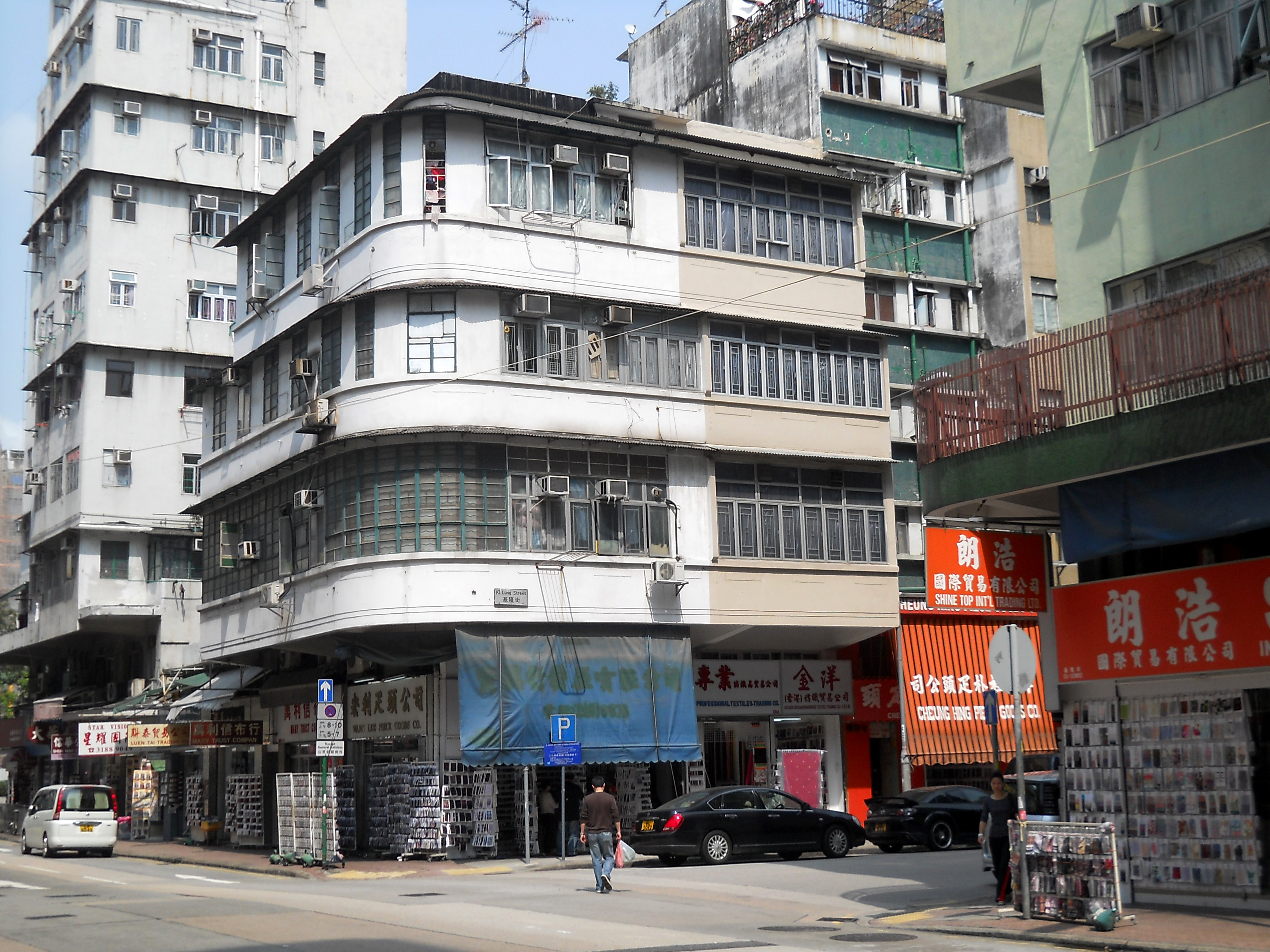 中文（香港）: 基隆街130號、132號